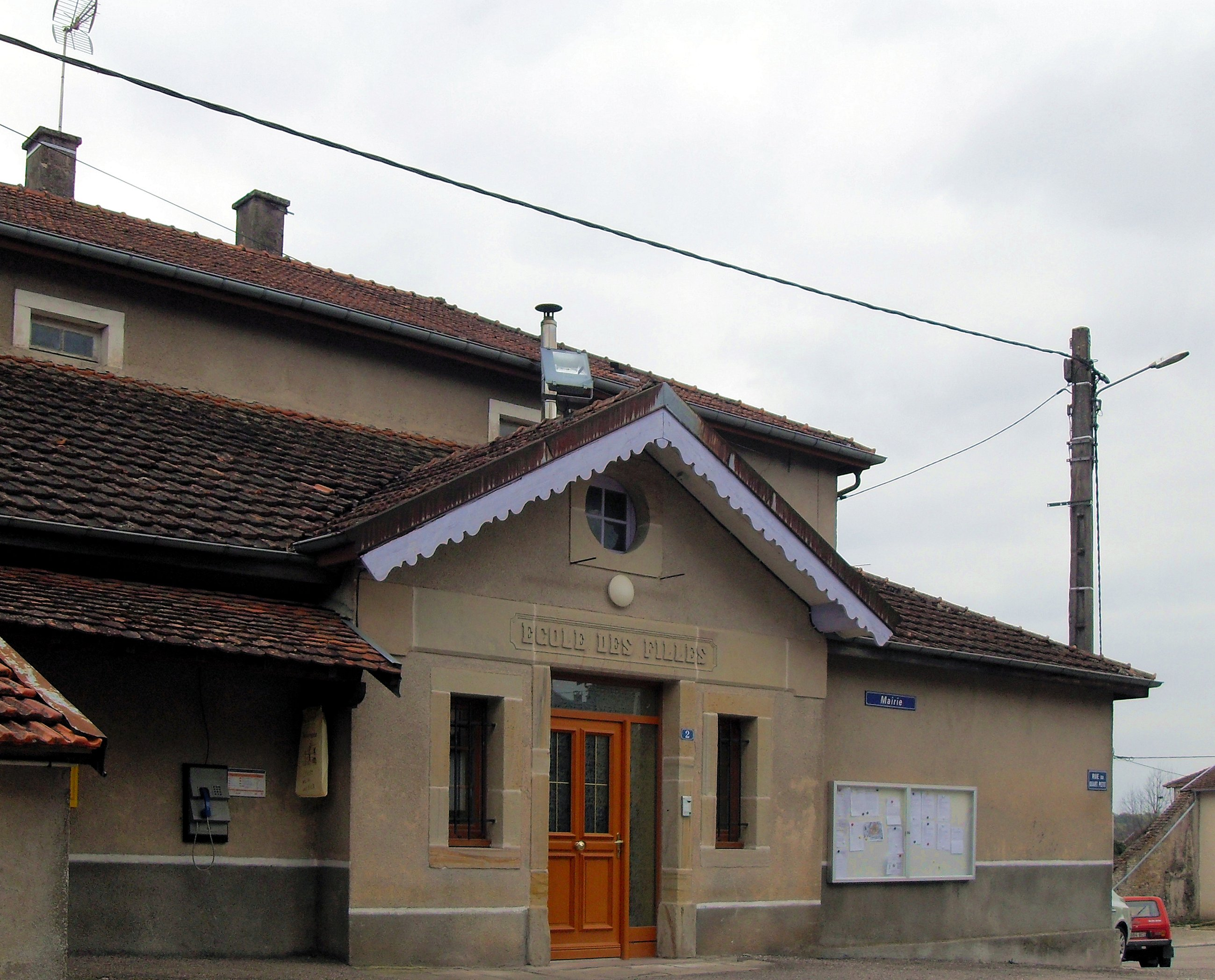 La mairie de Martinvelle